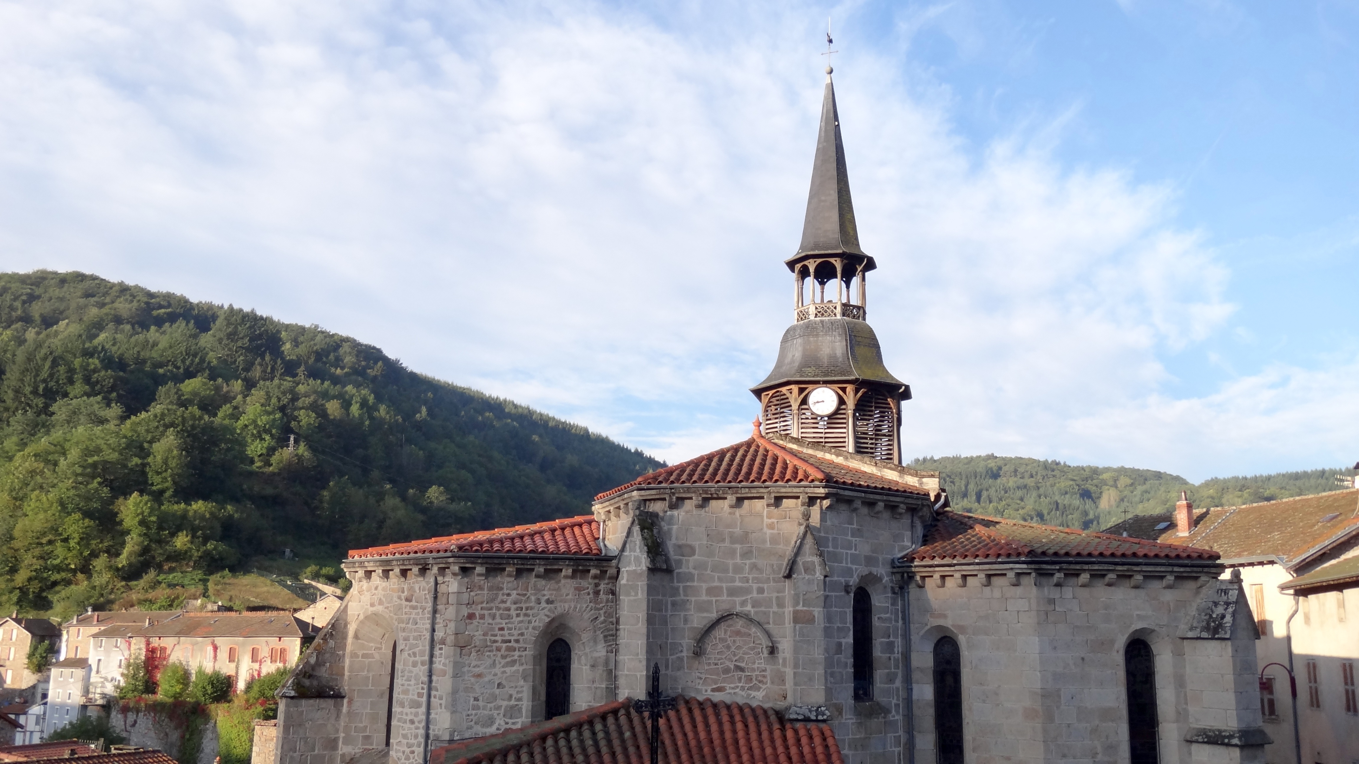 Église Notre-Dame d'Olliergues .